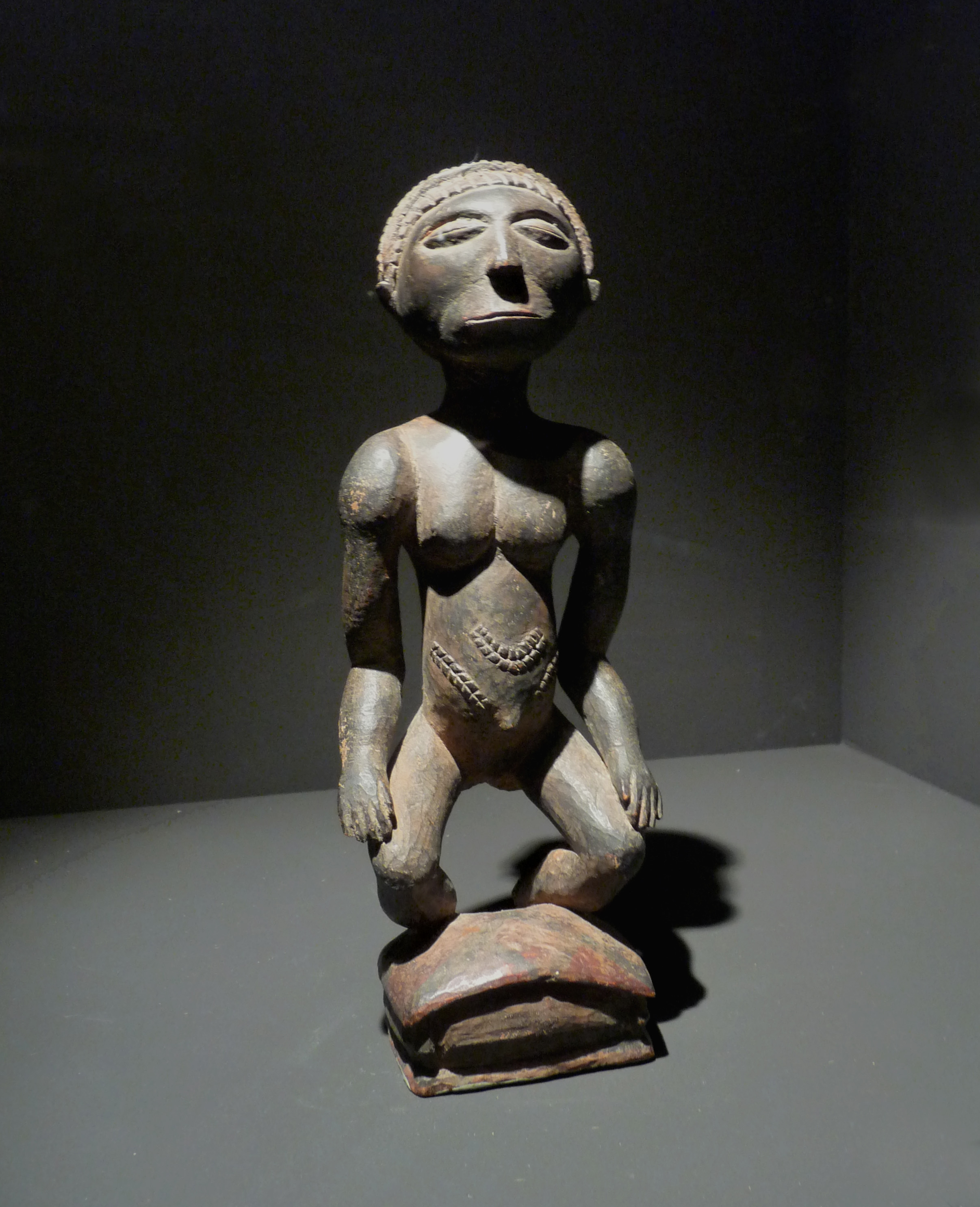 Statuette féminine. République démocratique du Congo, Holoholo. 19e siècle ou début du 20e siècle (Musée ethnologique de Berlin)